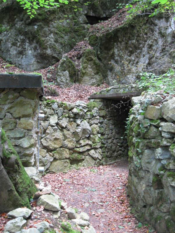 Holštejnská jeskyně